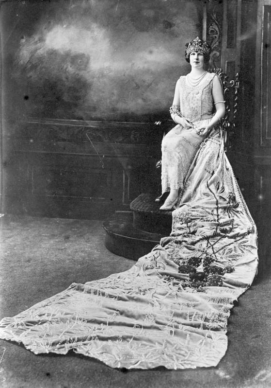 New Yorks ungekrönte Königin! Miss Estelle Storms, die neue Modekönigin New Yorks, welche in jedem Jahr neu gewählt wurde.